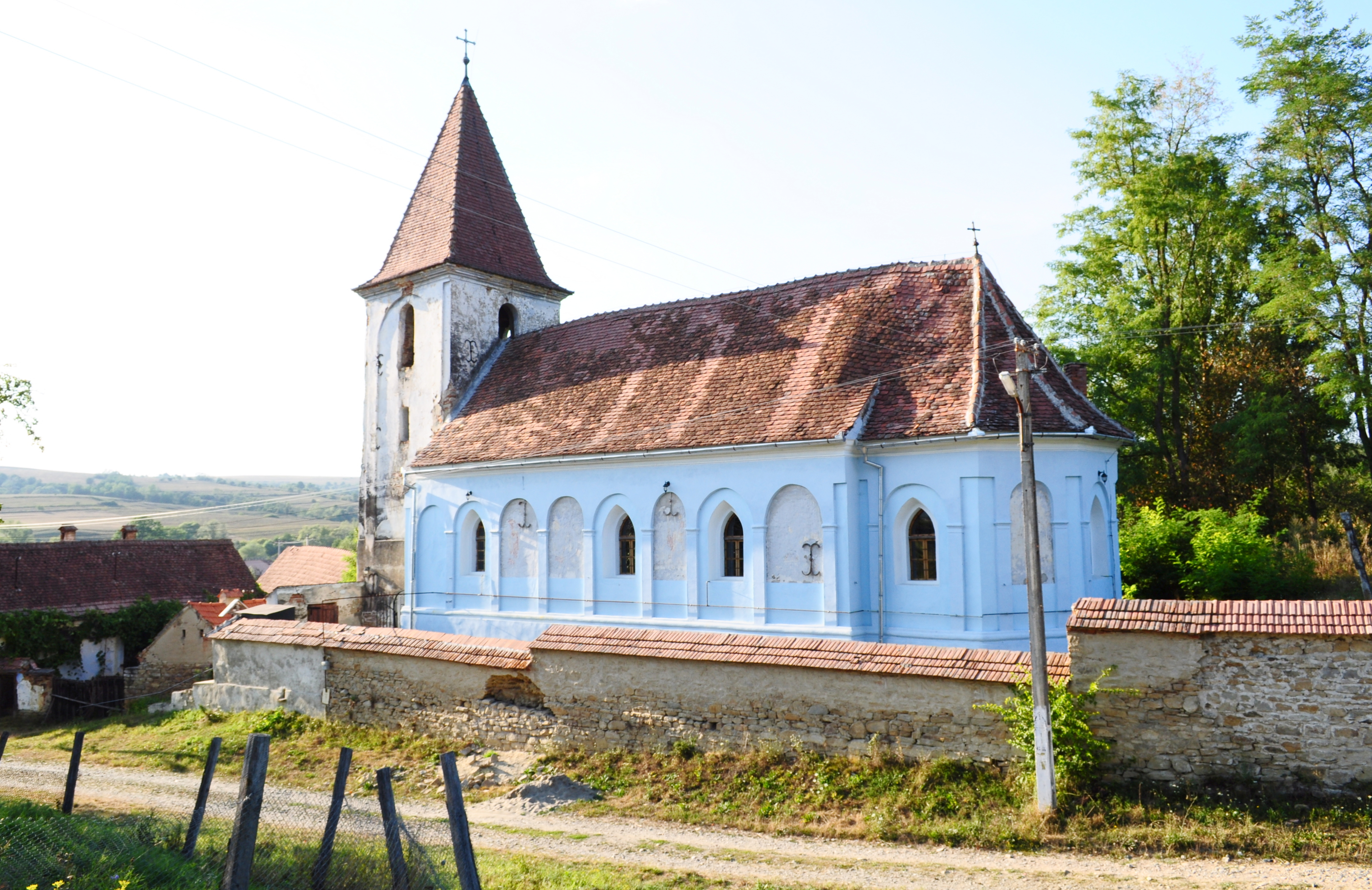 Biserica "Adormirea Maicii Domnului", sat SĂSĂUŞ; comuna CHIRPĂR